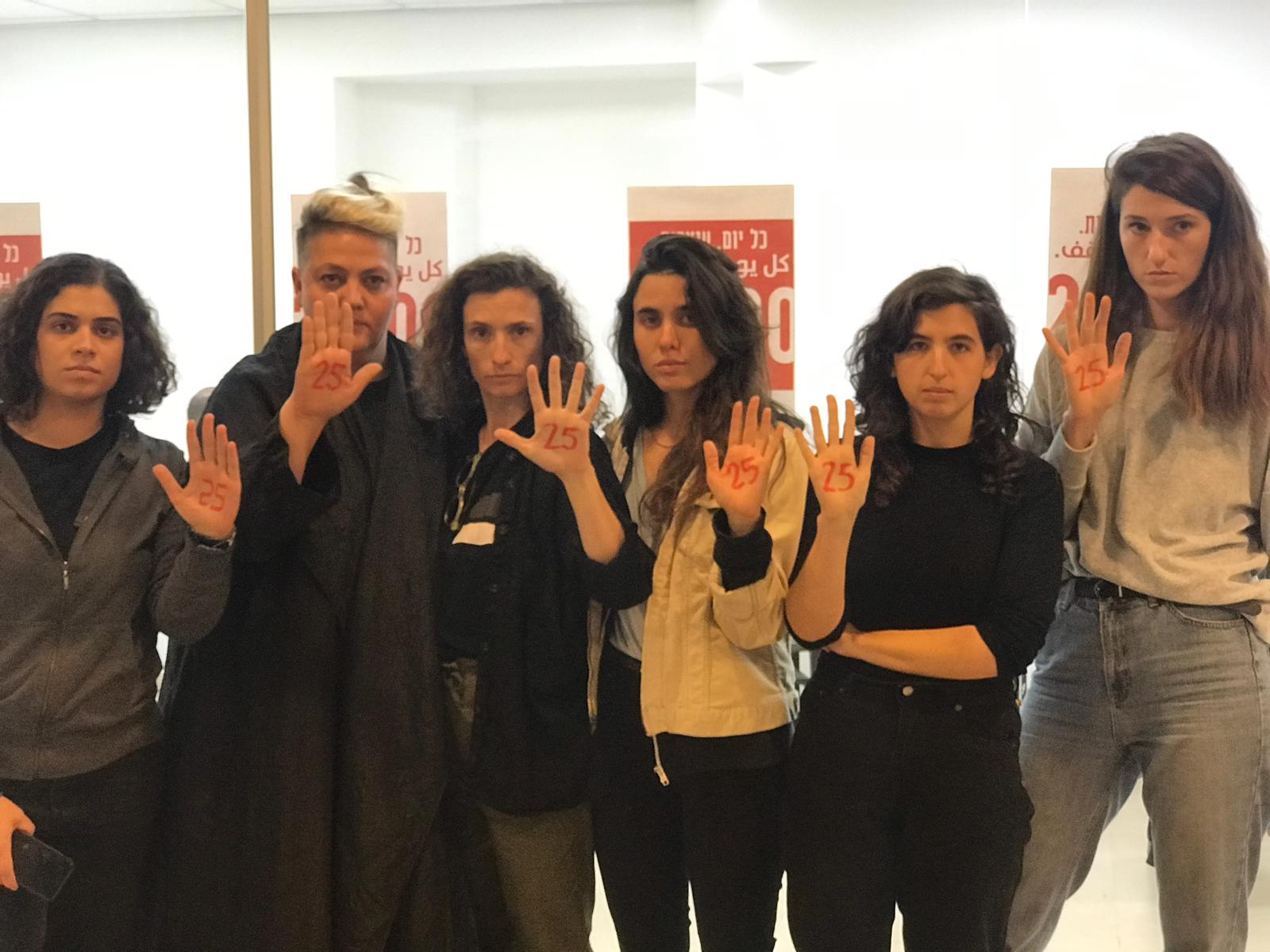 .יוזמות ומארגנות מחאת הנשים במטה המחאה 2018. מימין לשמאל: סתיו ארנון, דרור שדות, רותי קליין, ענת ניר, חן אריאלי, יארא כריים